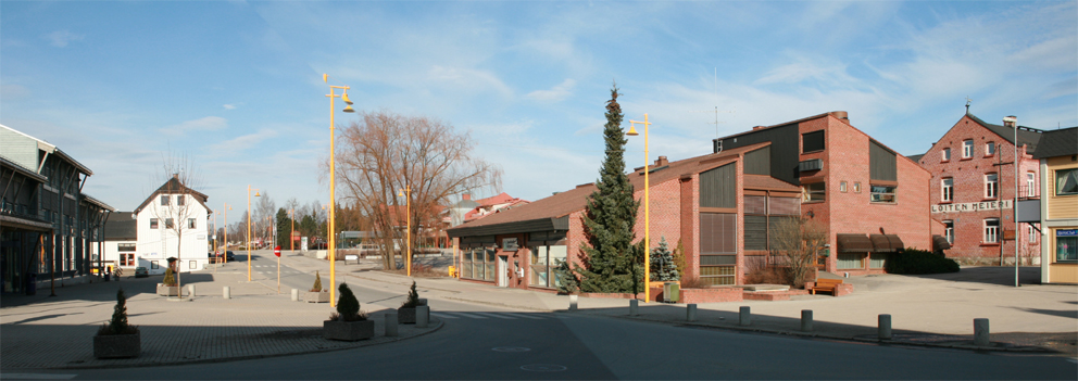 Løten sentrum, Løten, Hedmark.